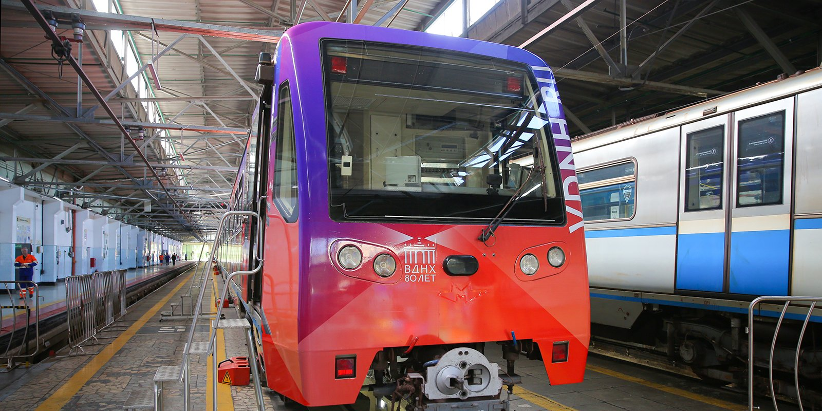 Поезд в депо